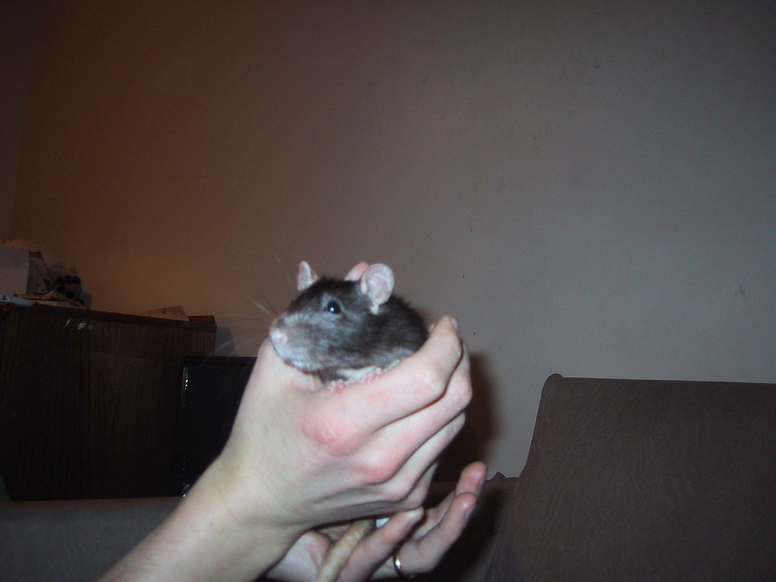 Rattus norvegicus